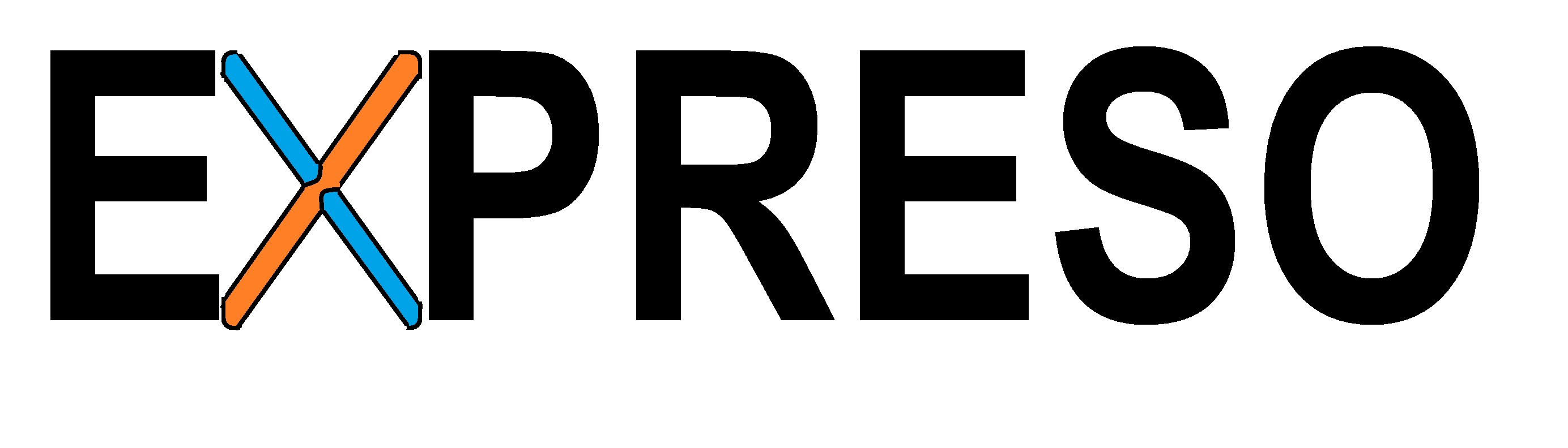 Logo de Expreso La Plata,que forma parte de la empresa Union Platense.